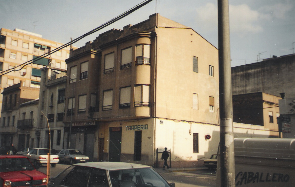 Mislata. Esquina de la avenida de Vicente Blasco Ibáñez con la calle Marcelino Oreja